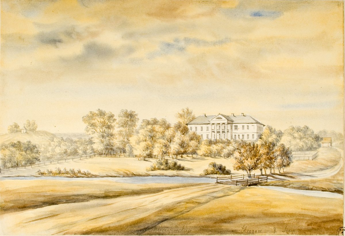 Беларуская (тарашкевіца): Грозаў (Hrozaŭ), сядзіба Мержыеўскіх (Mieržyjeŭski)